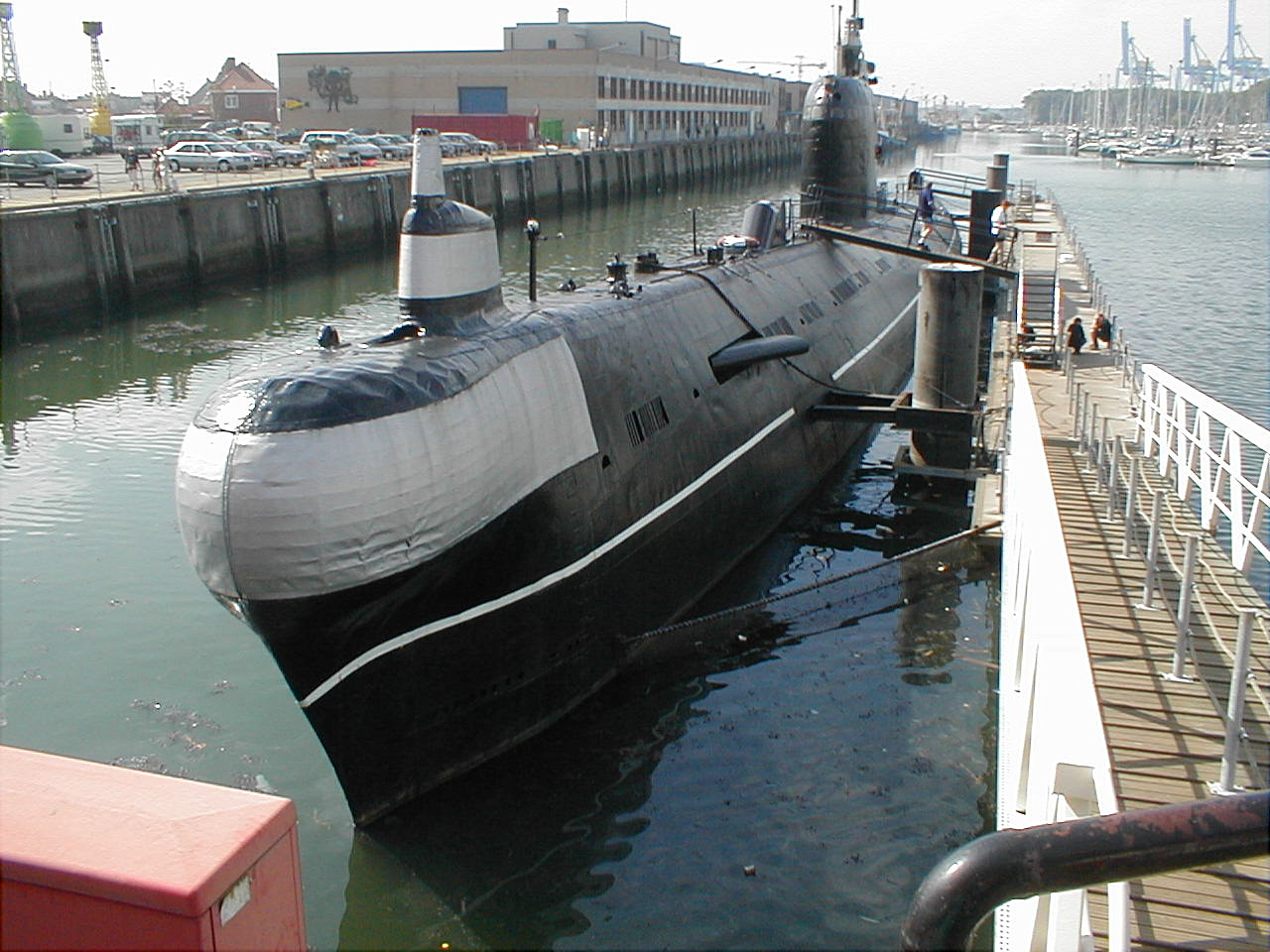 Sous marin conventionnel Russe de classe FoxTrot ici FoxTrot 480 servant de musée et amarré à Zeebruges